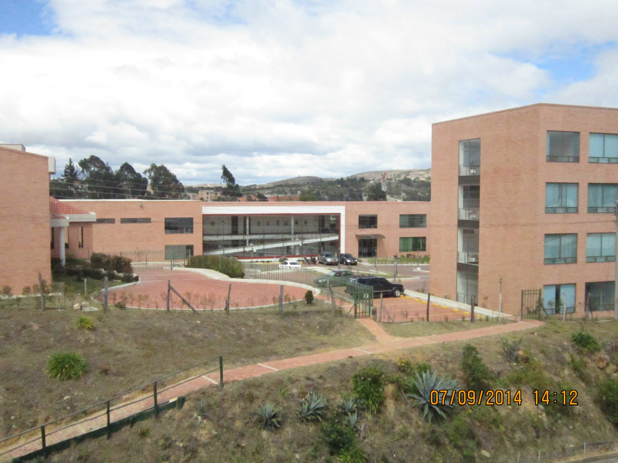 planta física Arquidiocesis de tunja